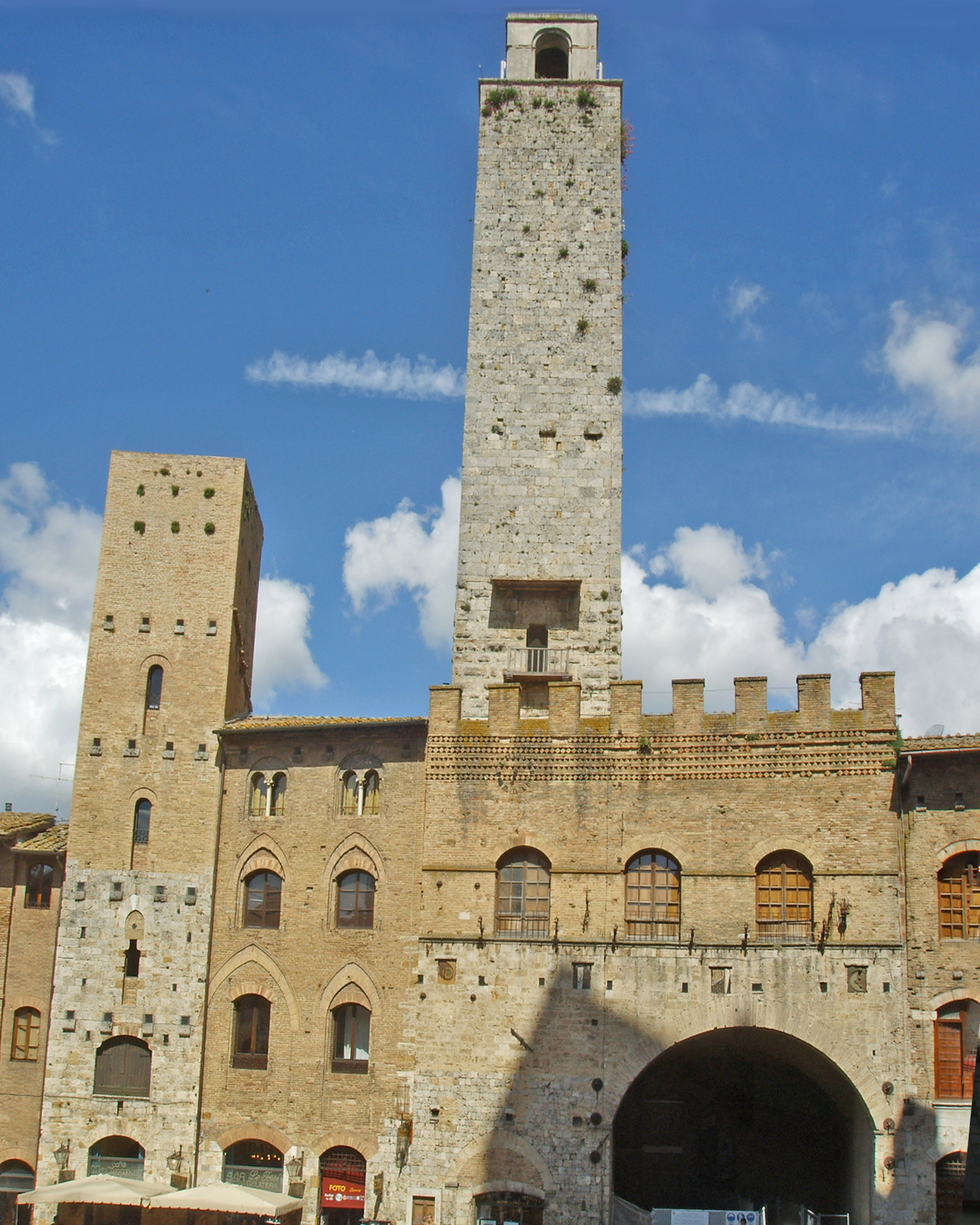 San Gimignano, Chigi Tower